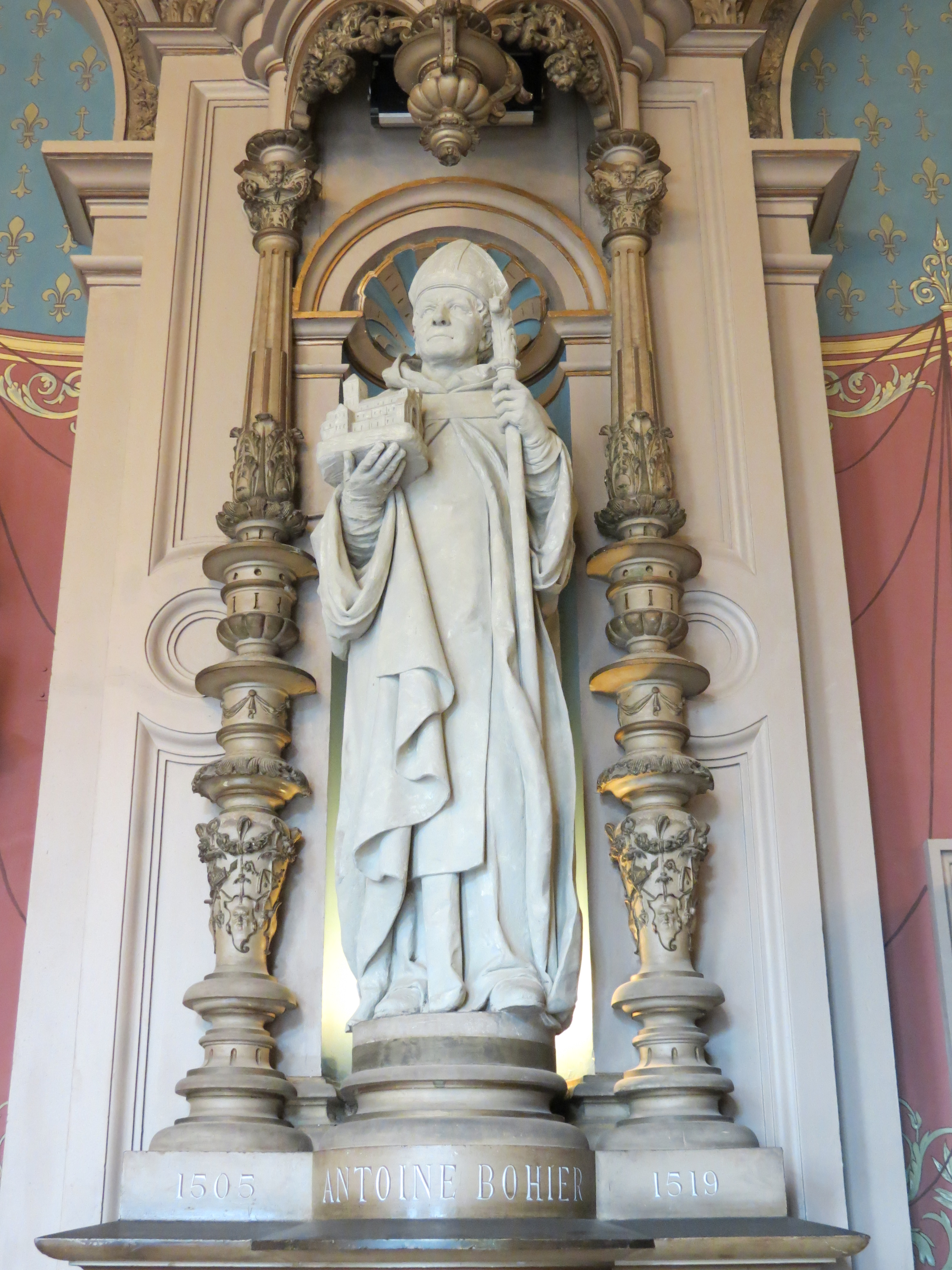 Antoine Bohier, 29e abbé de Fécamp (1505-1519).